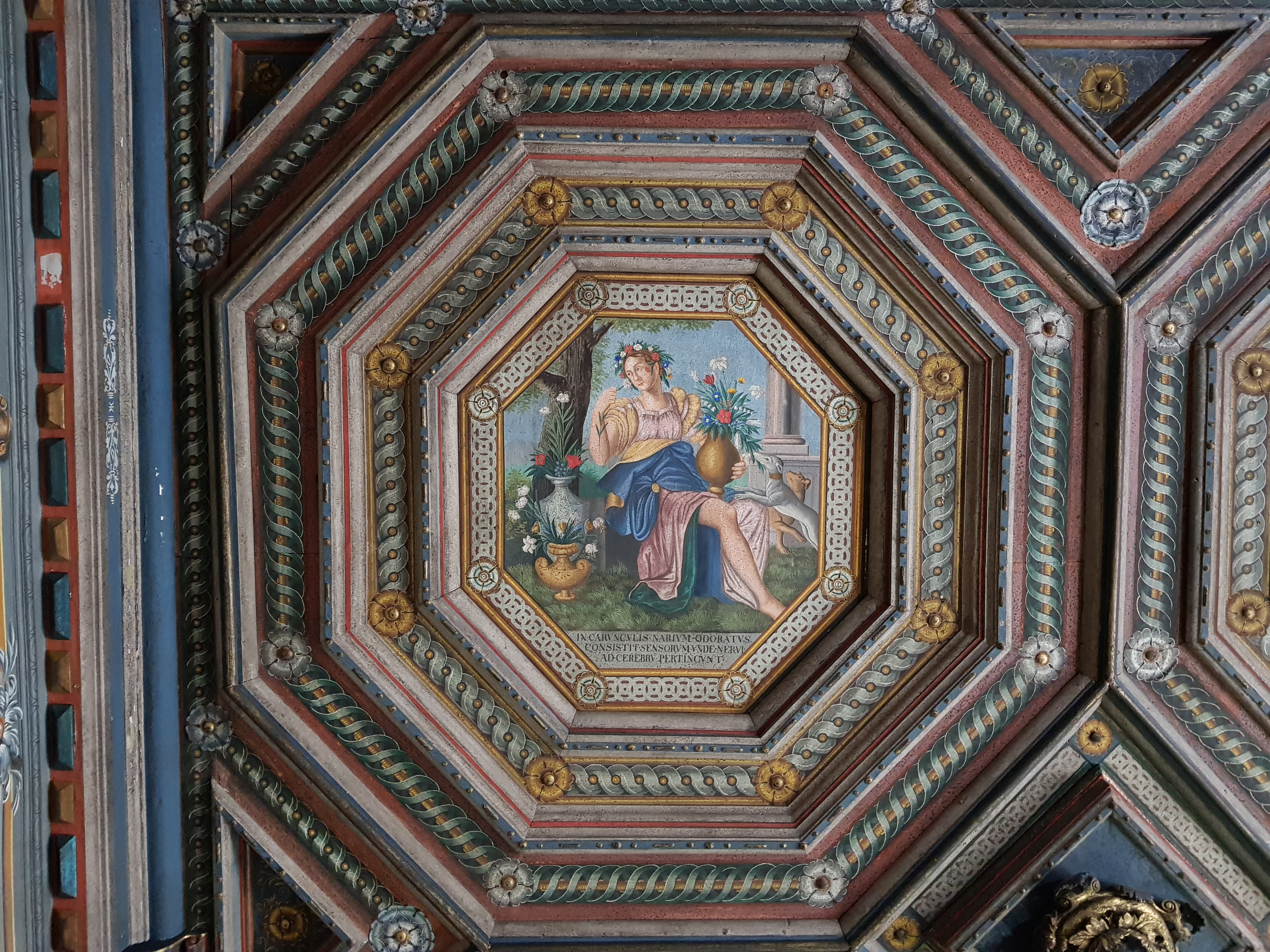 Alegorie čichu, kazetový strop v Pokoji smyslů v Adamově stavení na zámku v Jindřichově Hradci